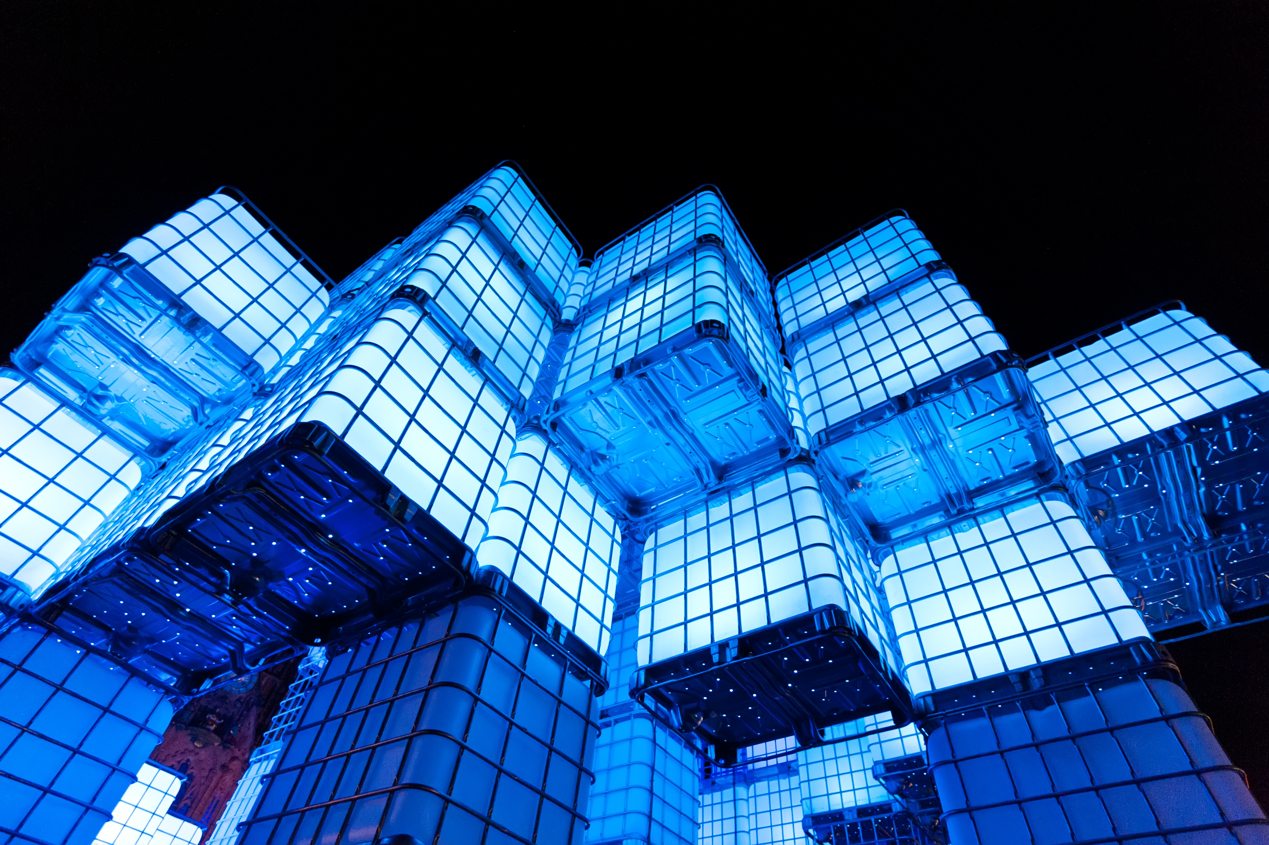 Einmal im Jahr findet das Kunstprojekt "DIE BLAUE NACHT" in Nürnberg statt, dabei wird ein großer Teil der Innenstadt blau beleuchtet und viele Künstler stellen ihre Lichtobjekte aus.